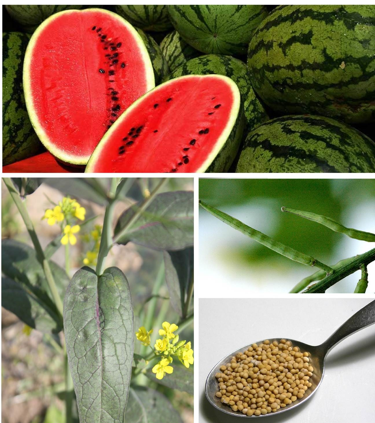 Produkty spożywcze FR (obwód wołgogradzki )